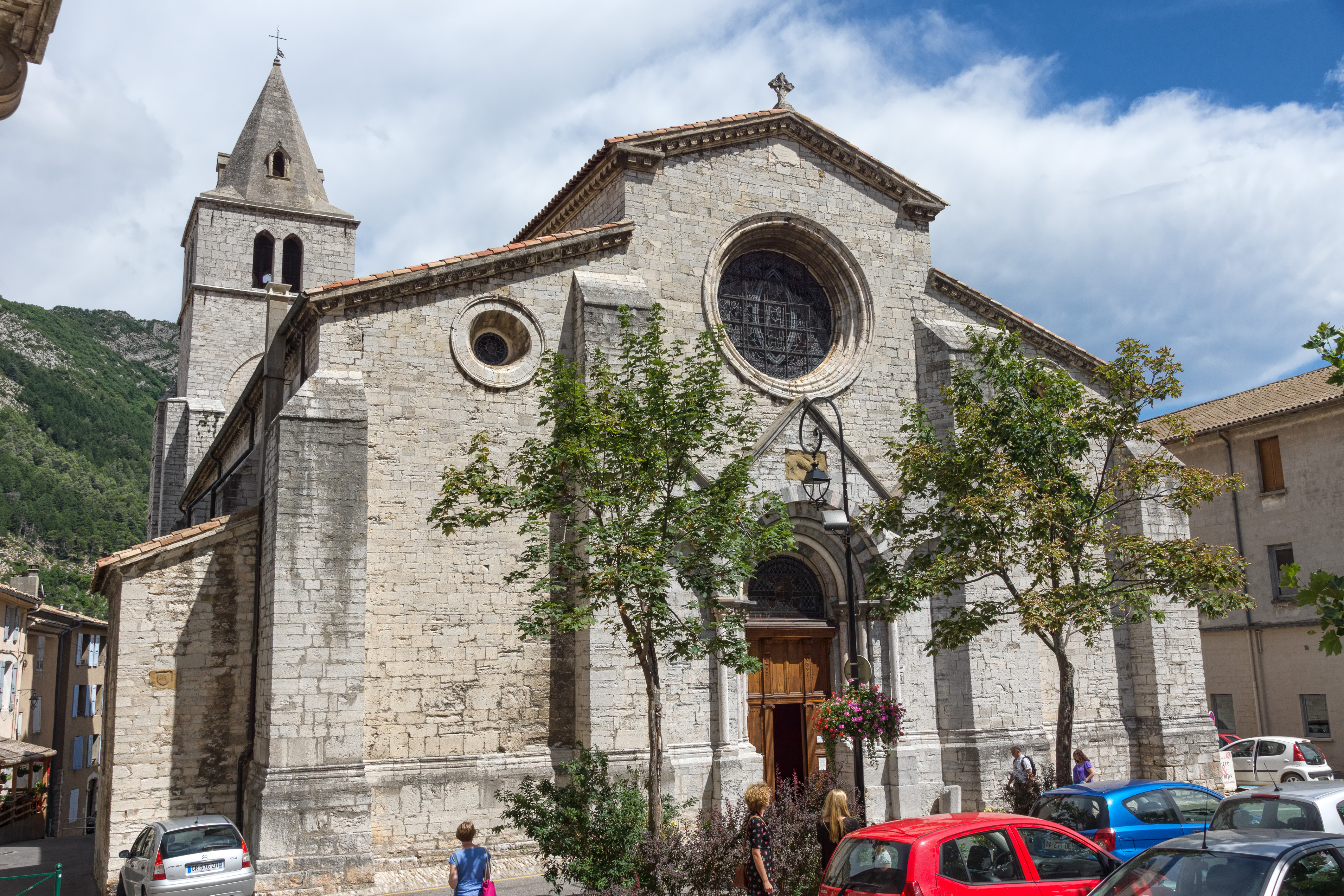 Cathédrale Notre-Dame-des-Pommiers de Sisteron